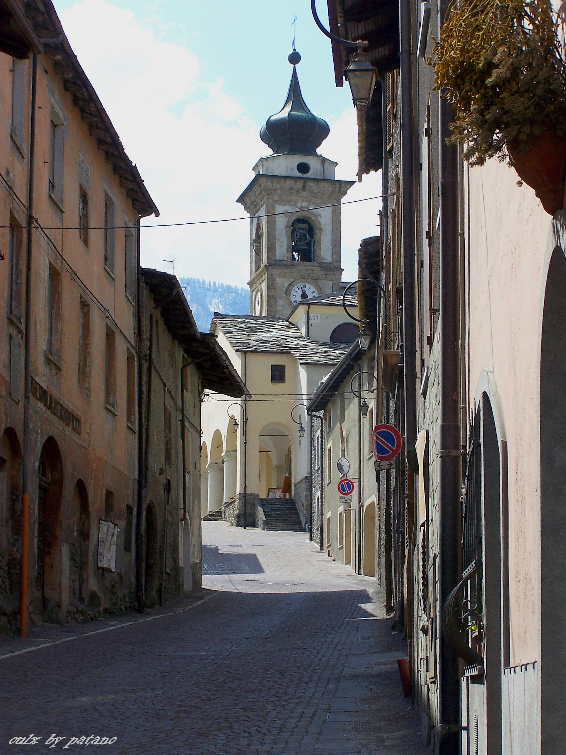 la chiesa